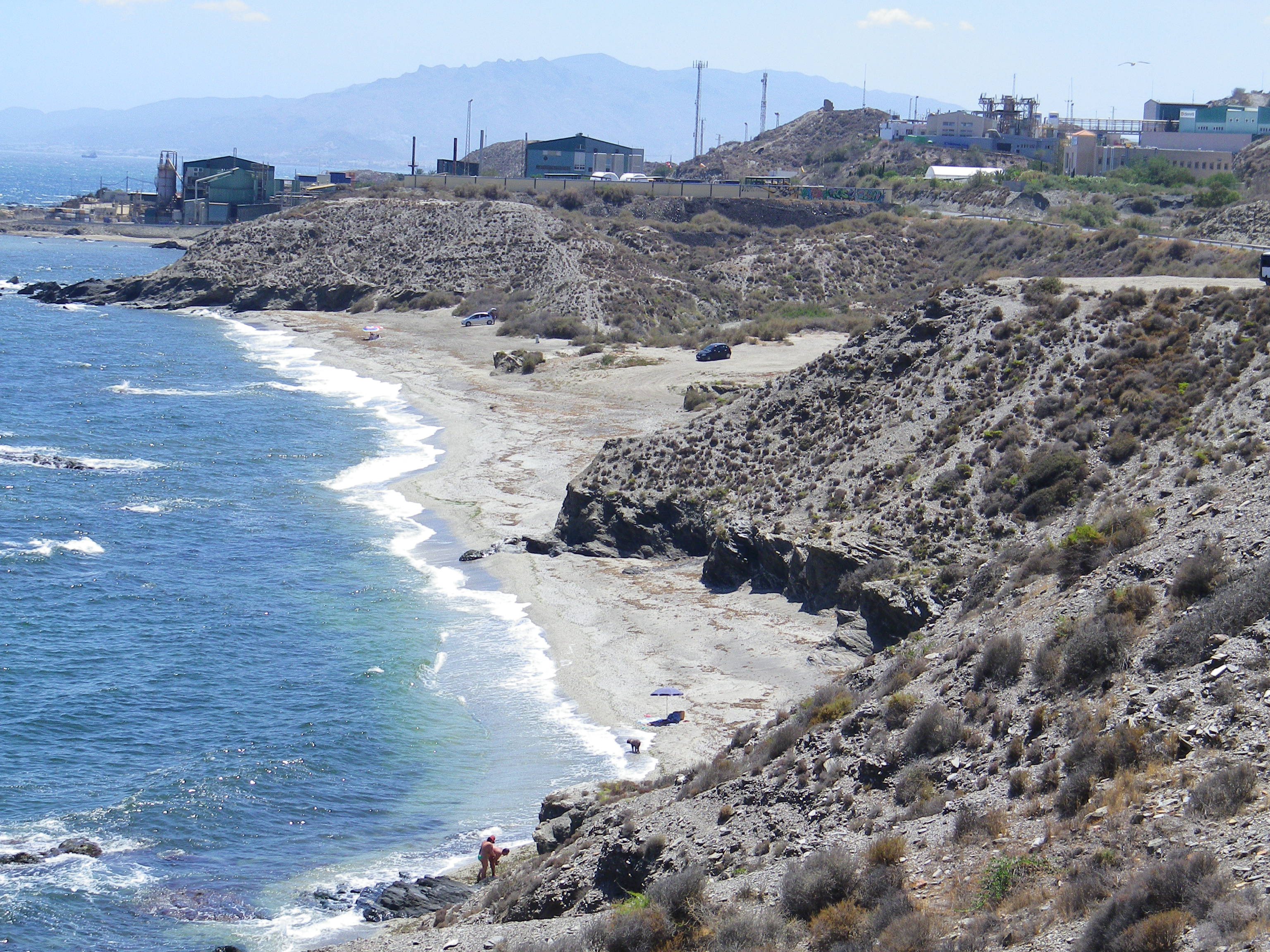 Fotografía de la planta de la empresa farmacéutica Deretil en Villaricos, municipio de Cuevas del Almanzora, provincia de Almería, España.